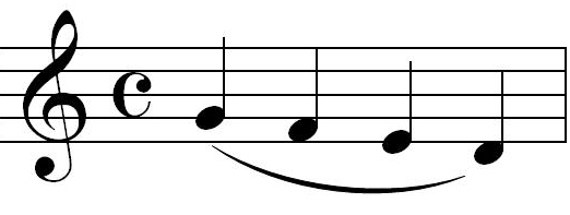 Legato